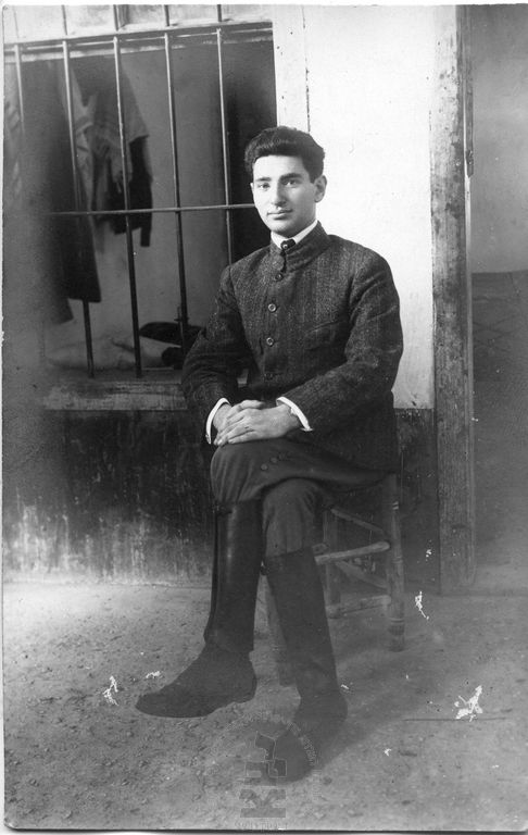 אליהו (רנה) מזיא יושב על כיסא כלוא בתא המעצר, כלא חאן אל-בשא, דמשק, סוריה